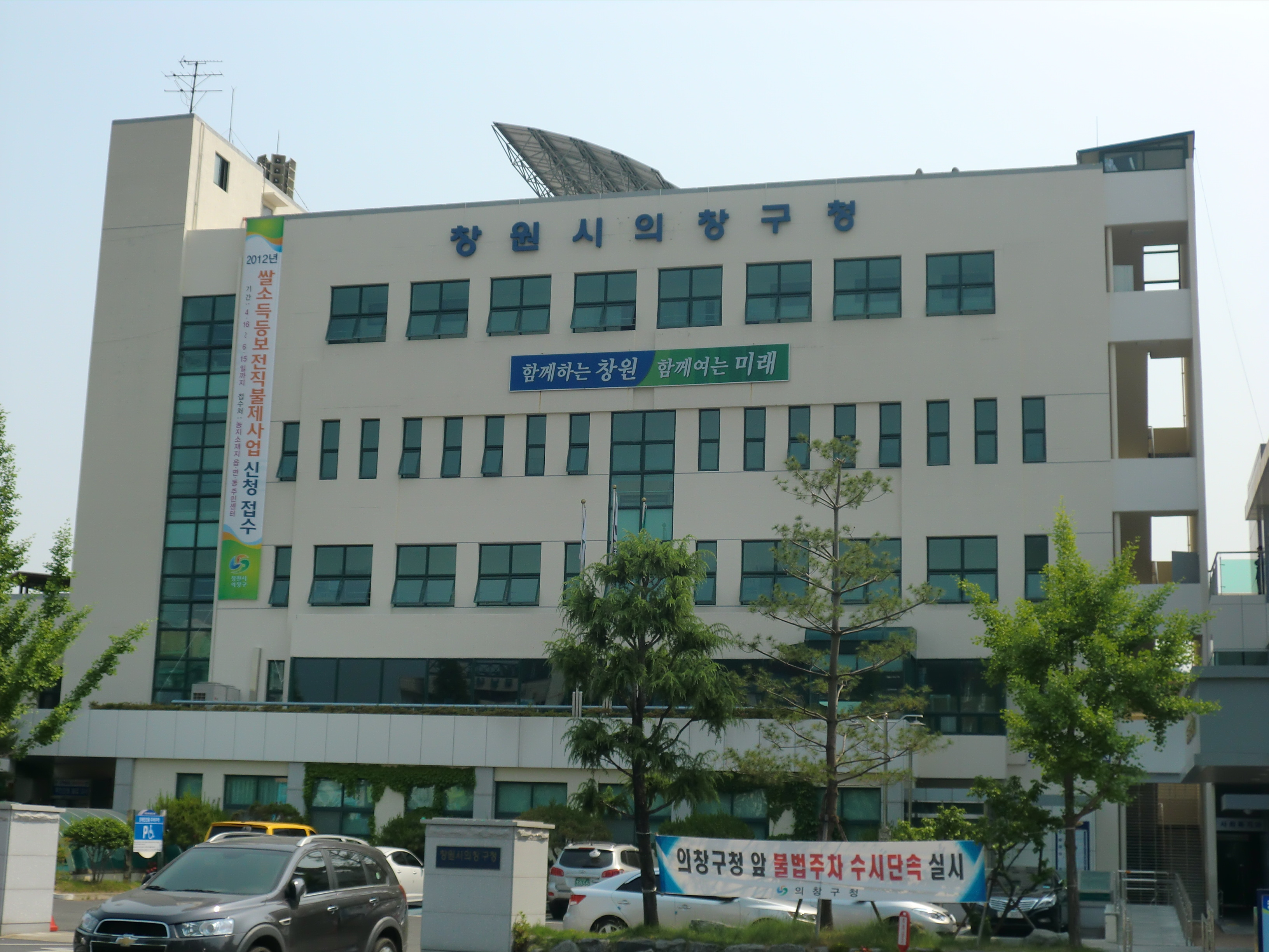 경상남도 창원시 의창구에 있는 의창구청